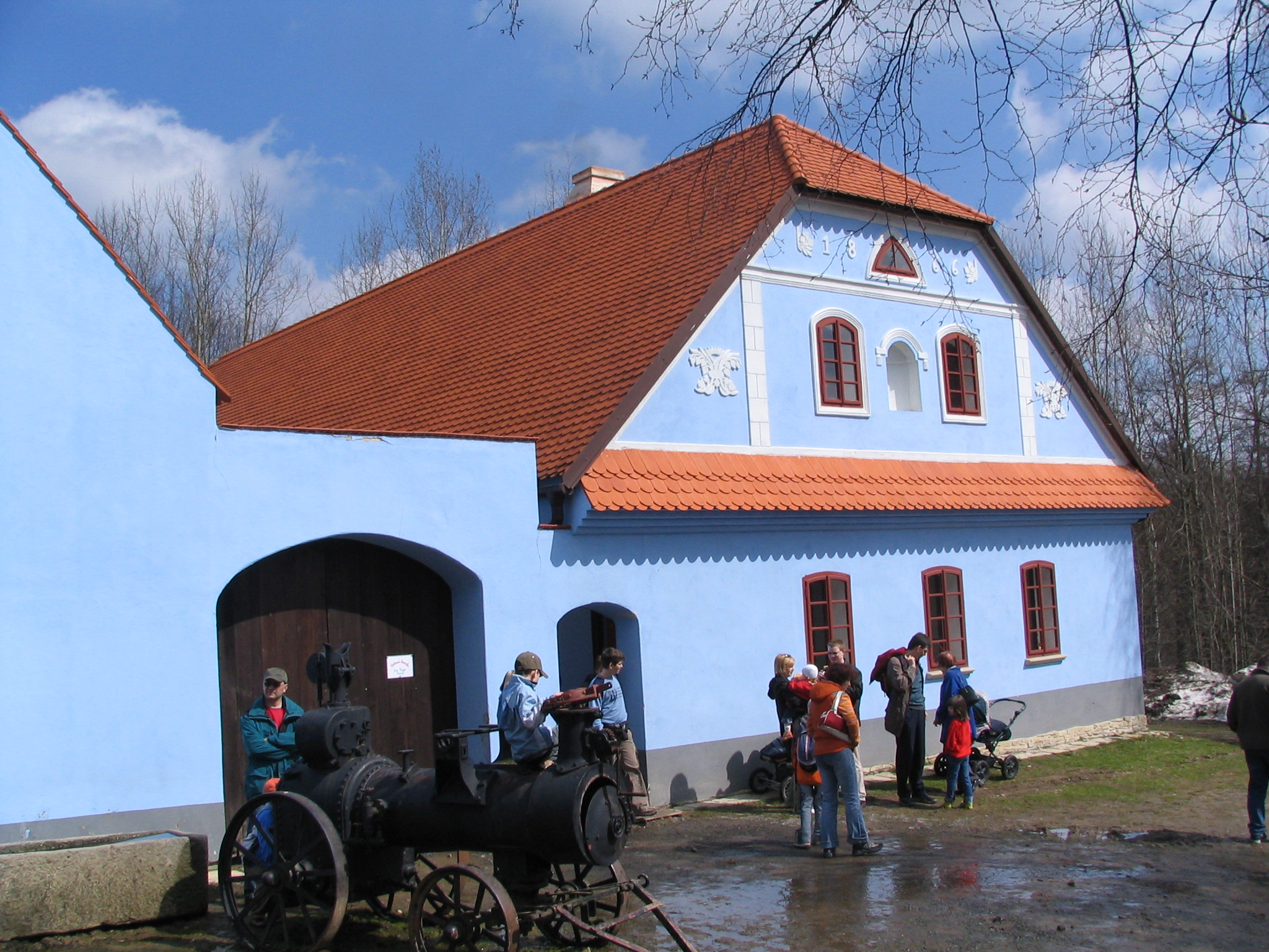 Soubor lidových staveb skanzen Vysočina (Veselý Kopec), Veselý Kopec